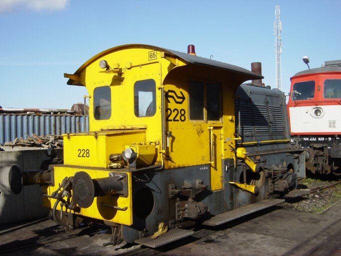 Rangeerlocomotief van de NS. Eigen foto Mark Voorendt, 9 oktober 2004 (open dag SSN) Categorie:Afbeelding Nederlands spoorwegmaterieel